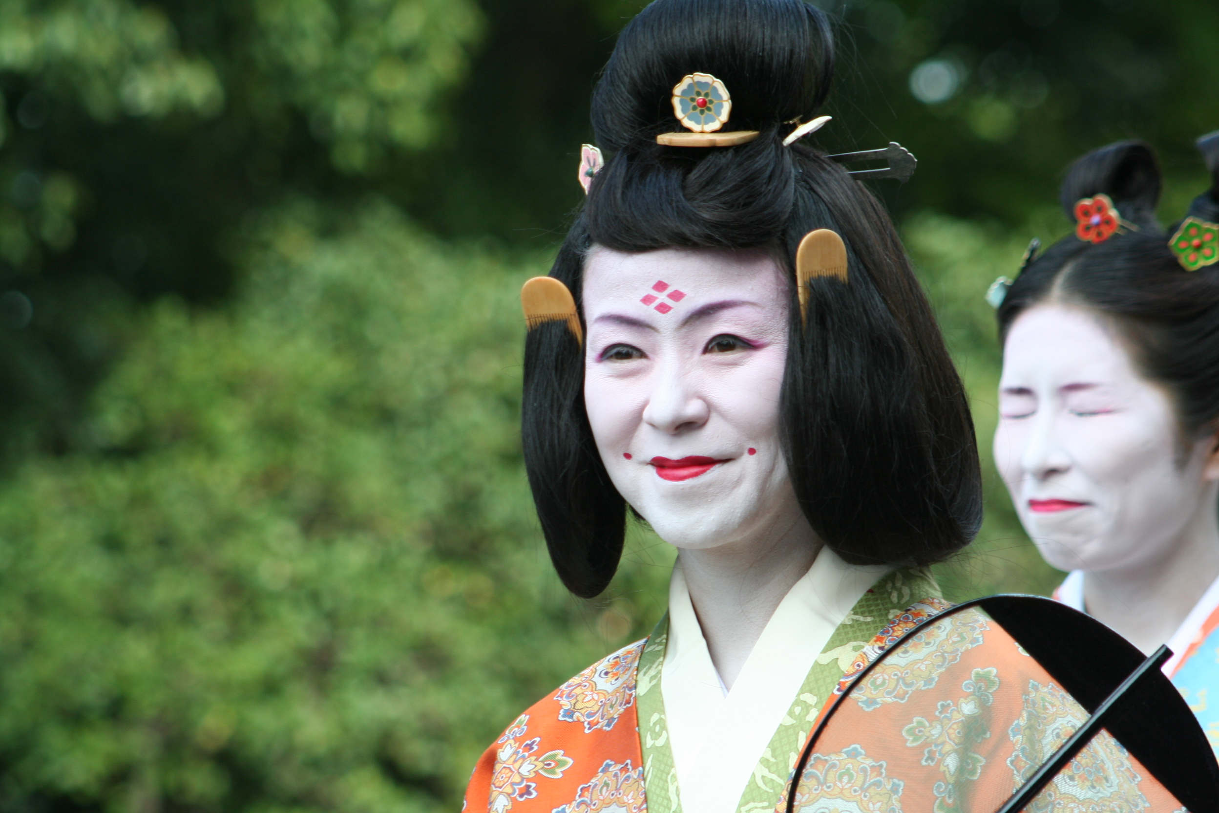 京都府京都市にて開催された時代祭。正午の御所から平安神宮までの行進の様子。2009年10月22日撮影。